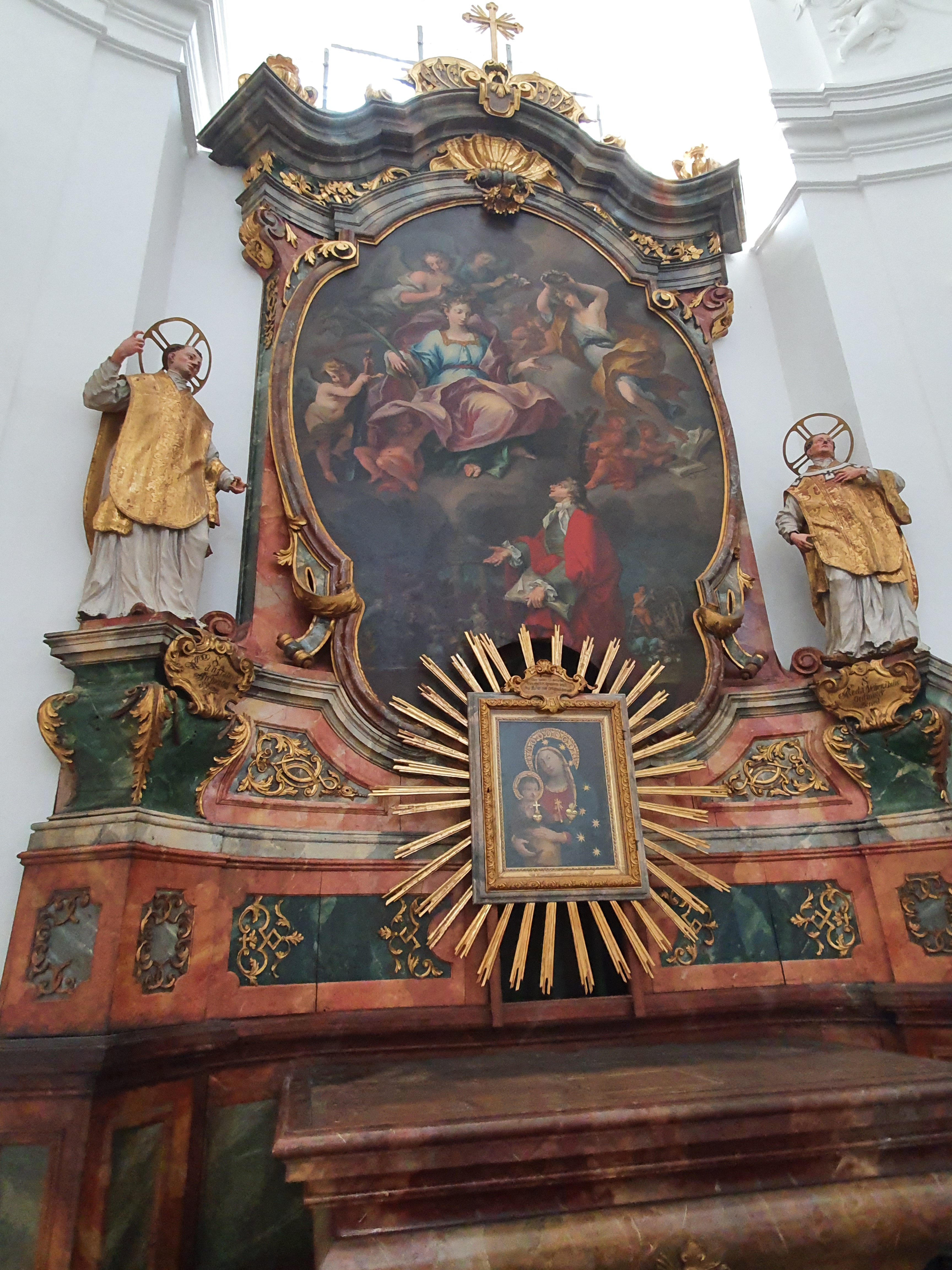 Sankt Katharina, Heilige der Philosophie